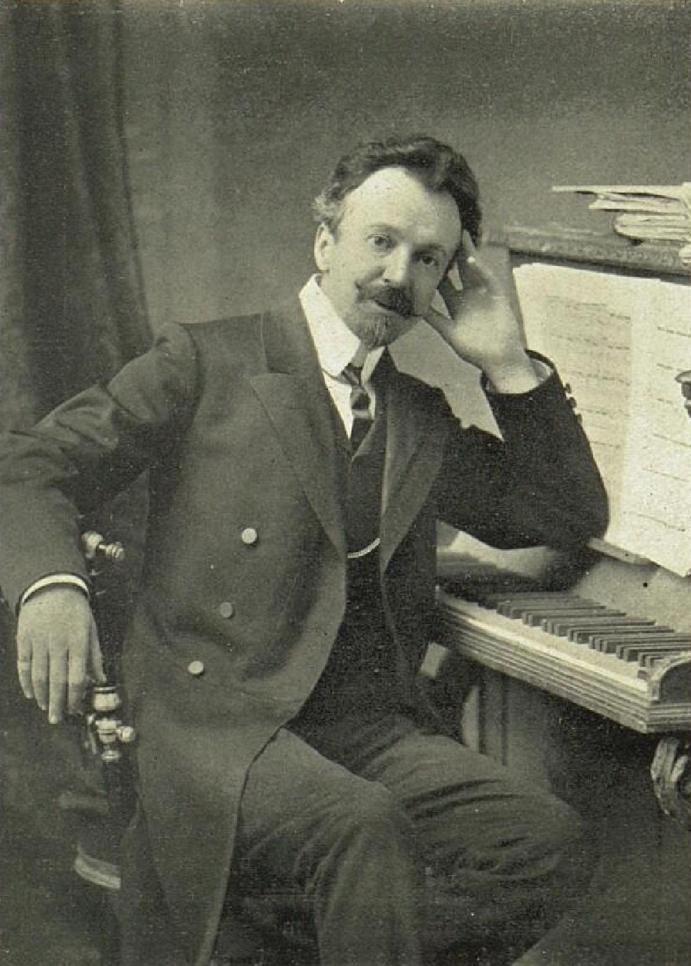 Bohdan Palice (1868-1916), český a později i Ruský klavírní virtuos, violloncelista, hudební skladatel, dirigent a hudební pedagog